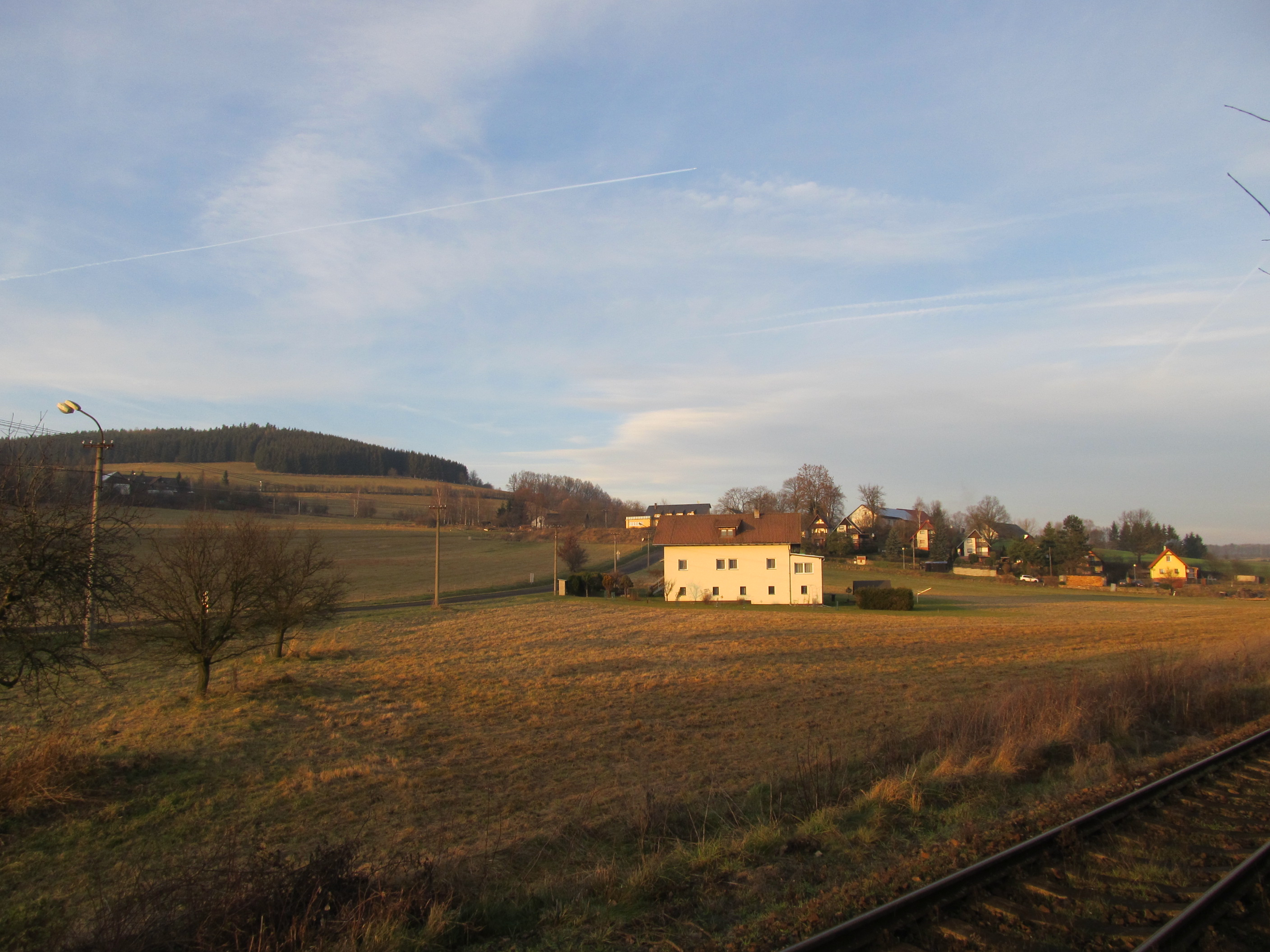 Úborsko - pohled od vlakové zastávky